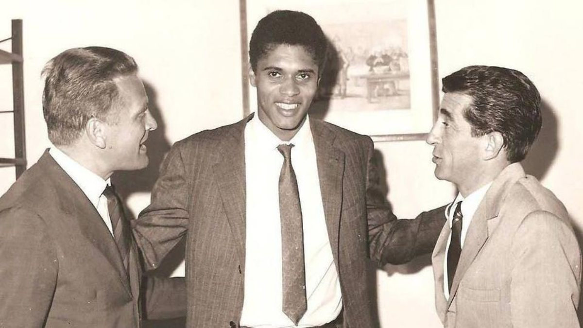 Giampiero Boniperti, Nenè e Andrea Arrica al momento dell'acquisto del calciatore brasiliano della Juventus da parte del Cagliari